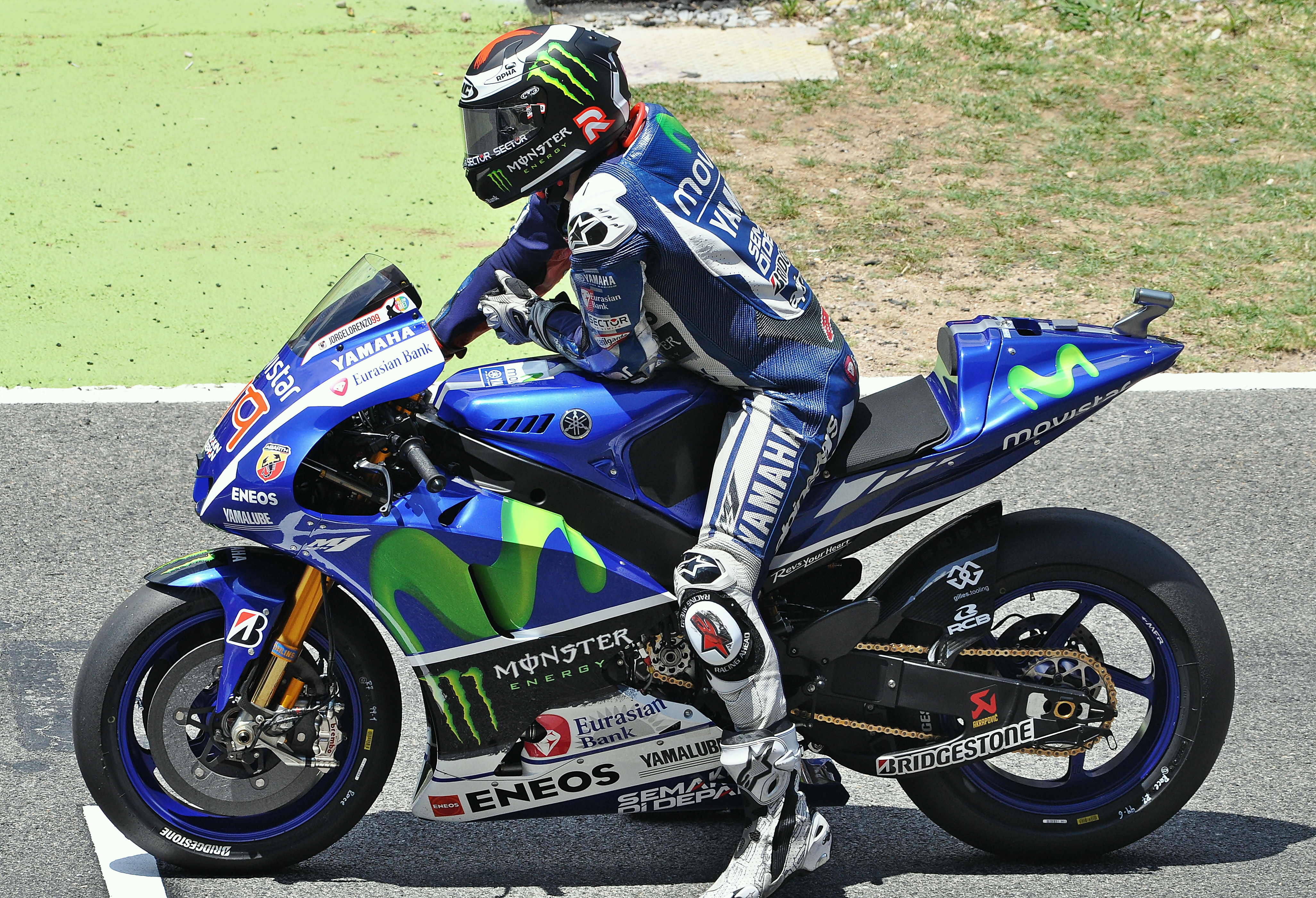 Gran premio de Cataluña